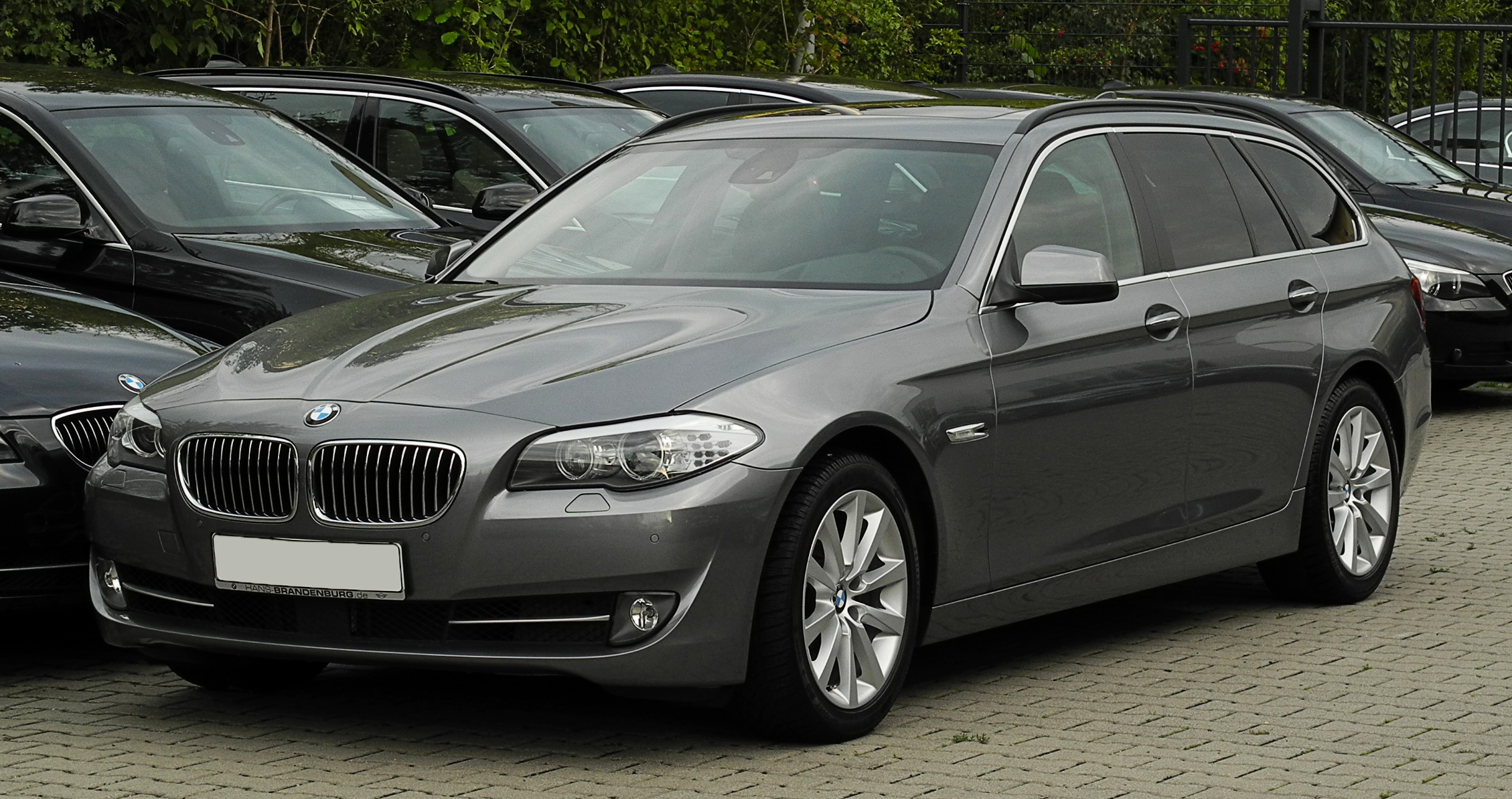 BMW 535i Touring (F11)